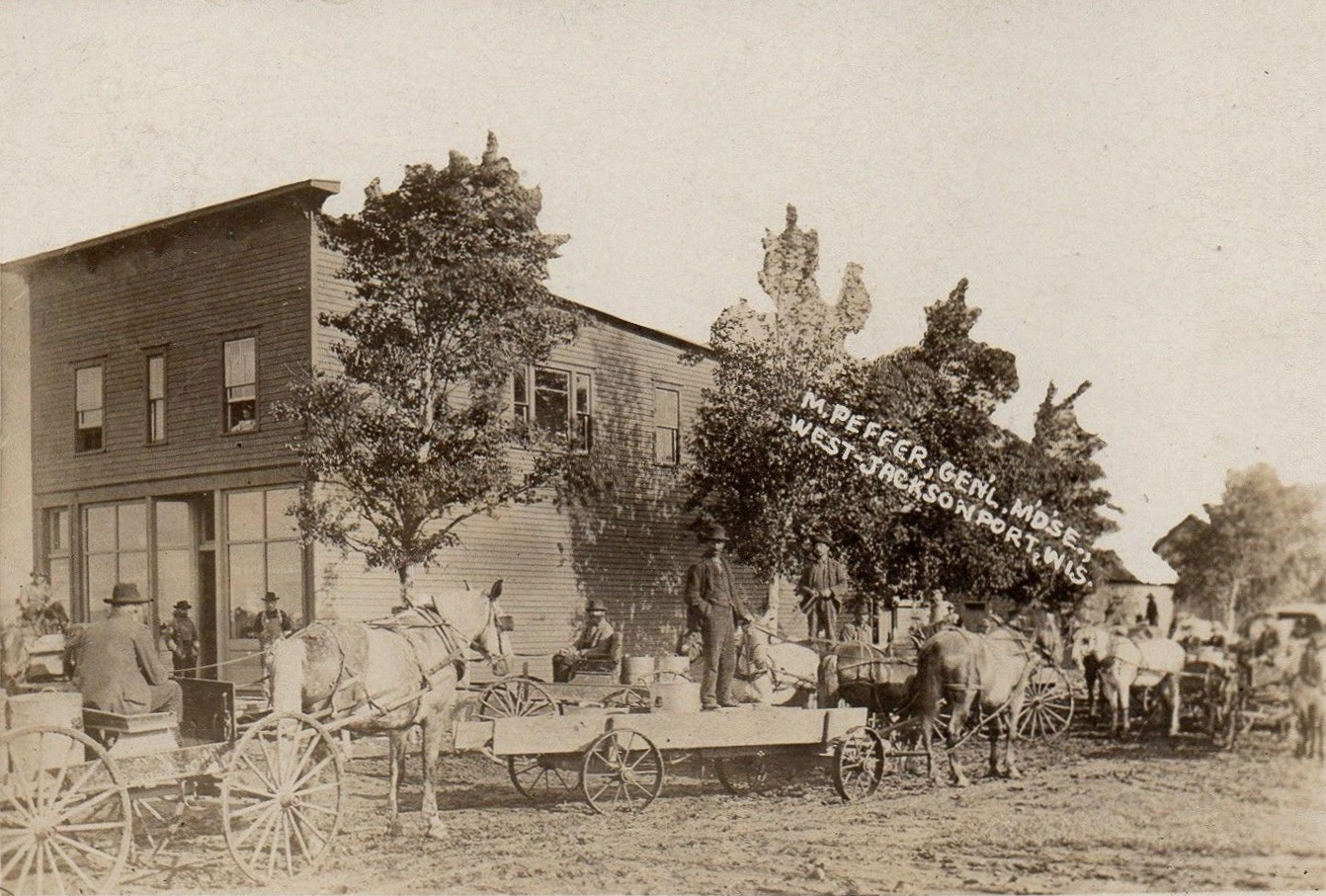 M. Peffer General Merchandise in West Jacksonport, Wisconsin